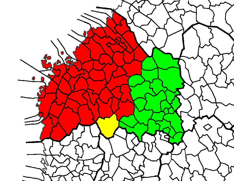 Priskribo Vaasan lääni Province of Vaasa, Finland Gubernio de Vaasa, Finnlando